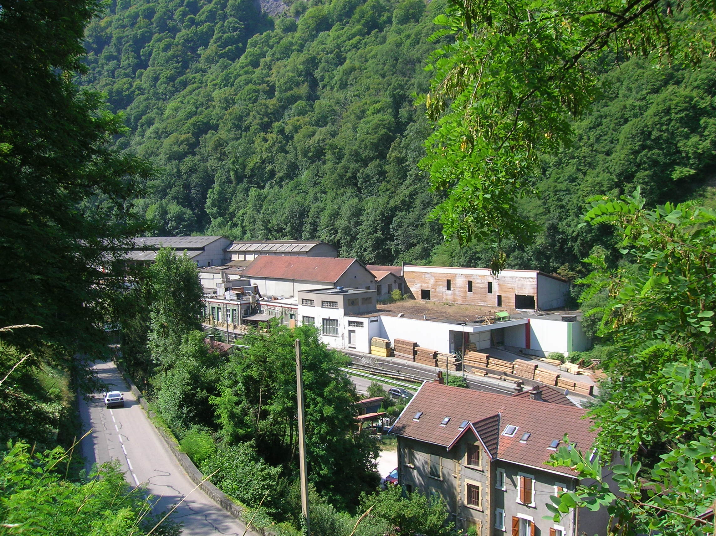 la Gorge à Domène, Isère, France. Anciennes papeteries de la Gorge reconvertie en scierie.